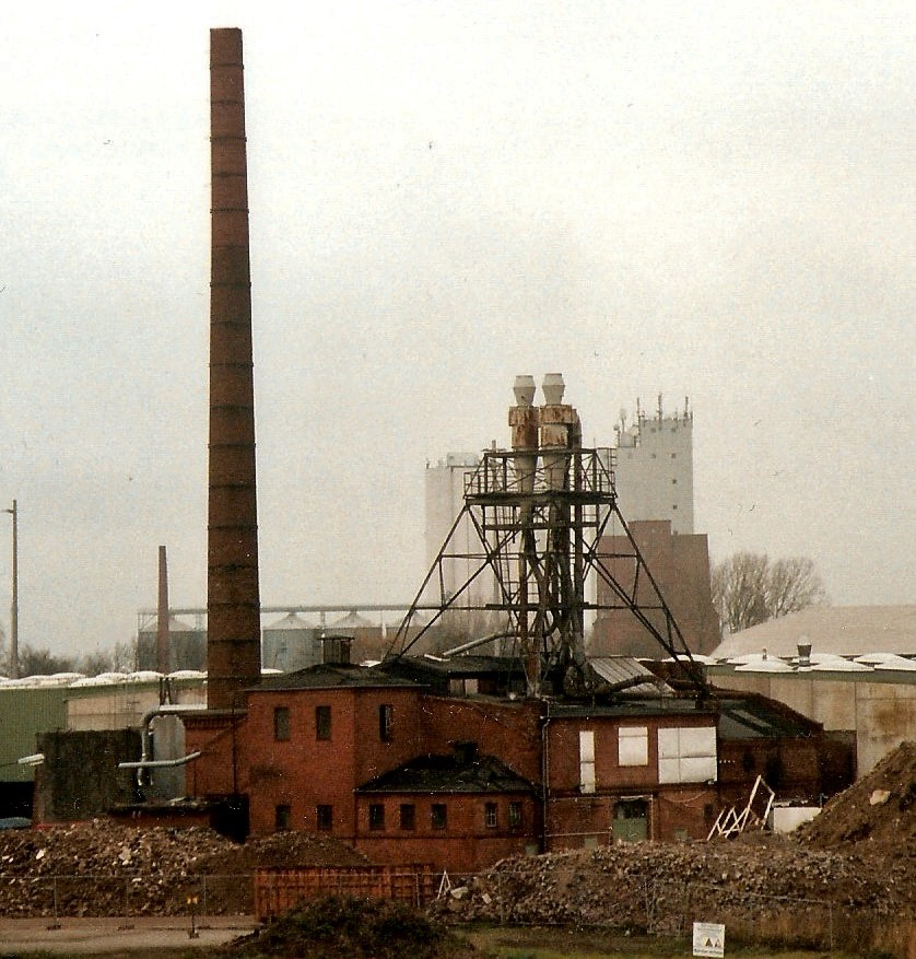 Produktionsgebäude